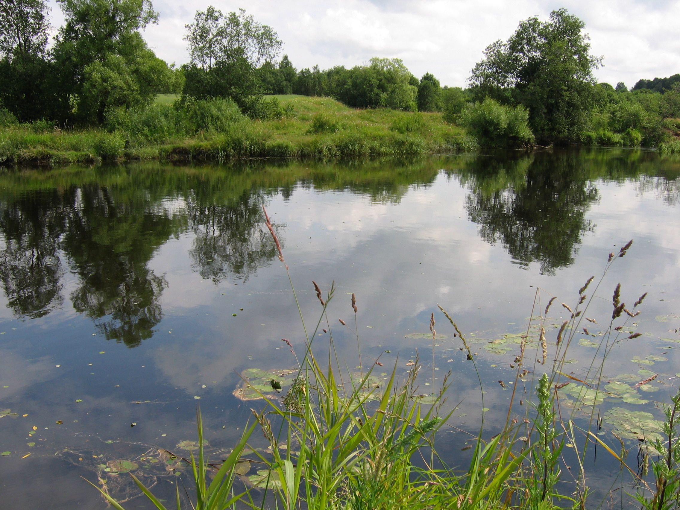 Река Кава у Великого села